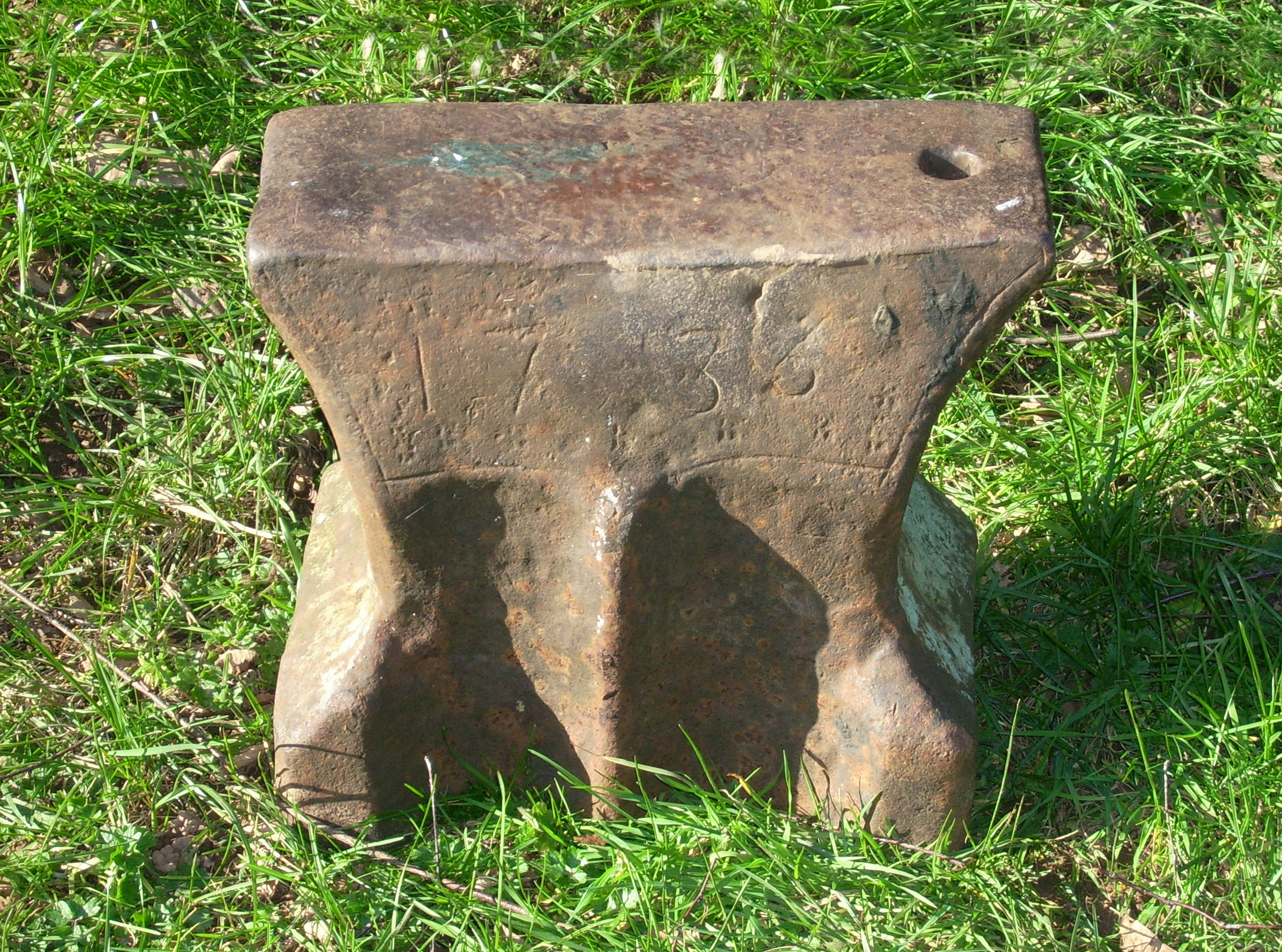 Amboss von 1736, Anvil